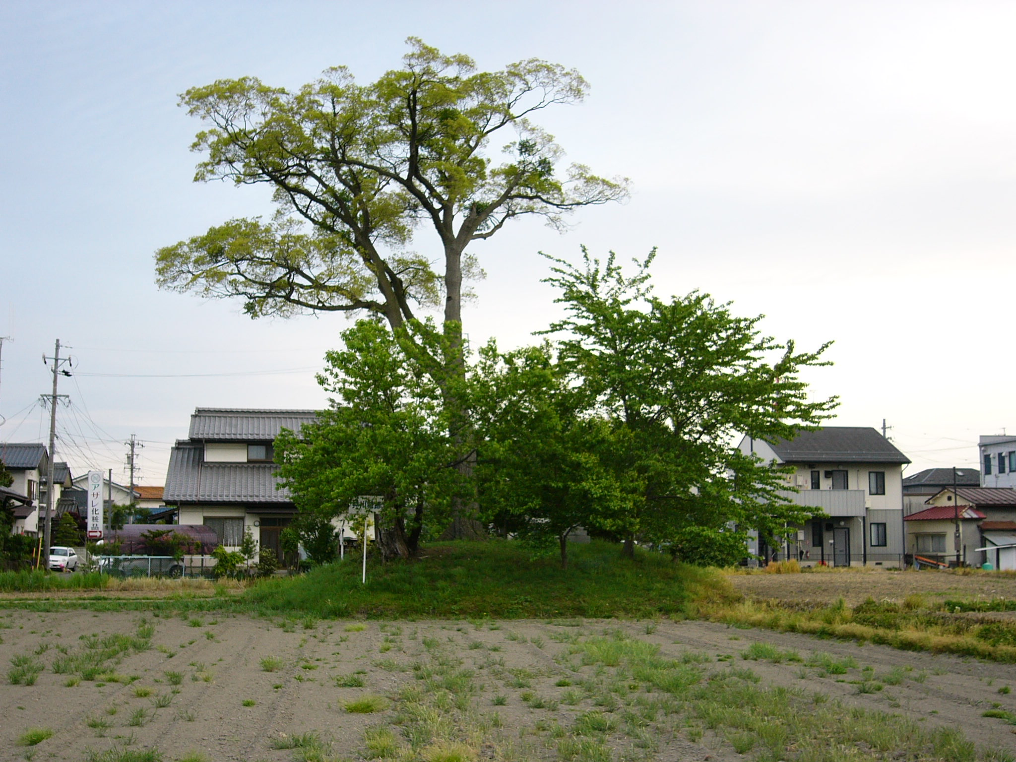 井川城跡にて投稿者が撮影